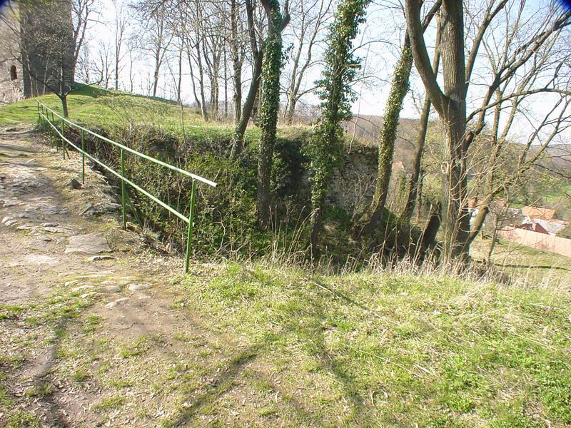 Tautenburg, eigenes Foto von 2001 Mewes 09:20, 13. Feb 2005 (CET) Blick über den Halsgraben zur Kernburg Kategorie:Polarlys-Test